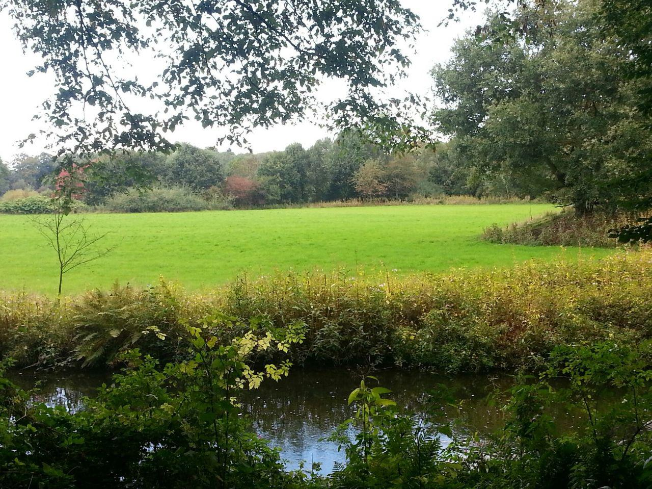 Wupperinsel mit Mühlengraben im Vordergrund